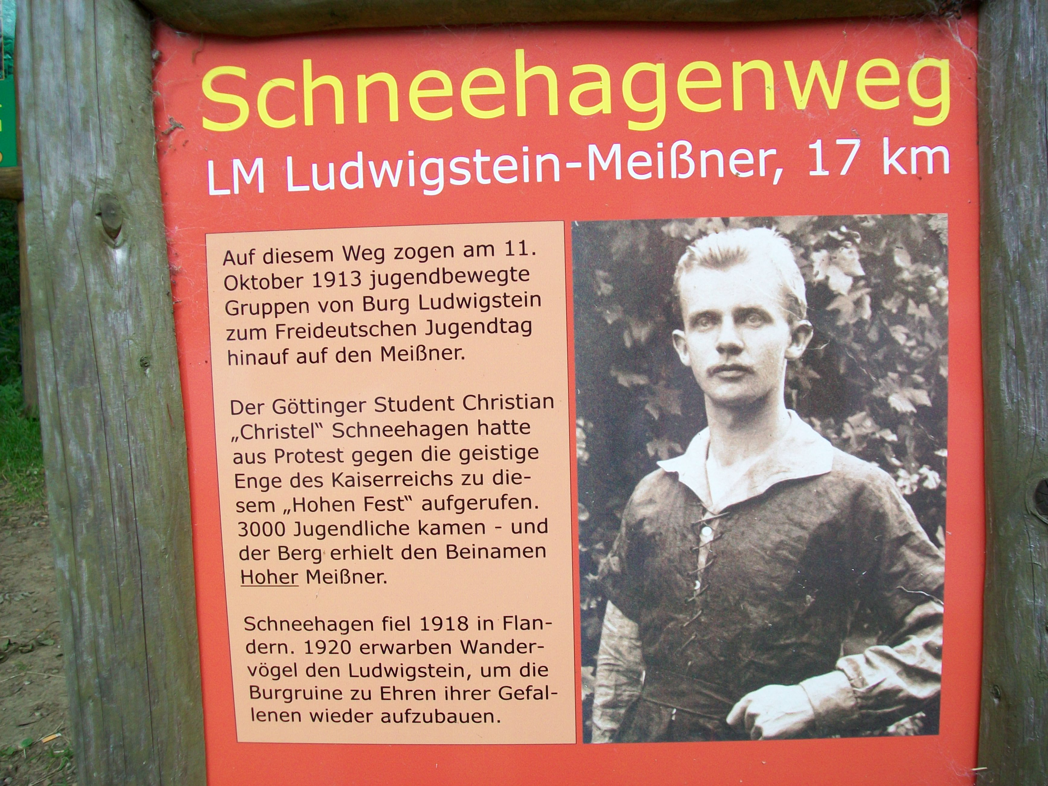 Erinnerungstafel am Wanderweg auf dem Hohen Meißner (Deutschland), benannt nach dem Göttinger Studenten Christian Schneehagen (+1918)